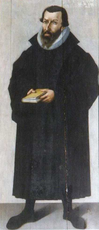 Stadthagen, St.-Martini-Kirche, Epitaph des Stadtpfarrers, Landessuperintendenten und Reformators Jakob Dammann († 1591)